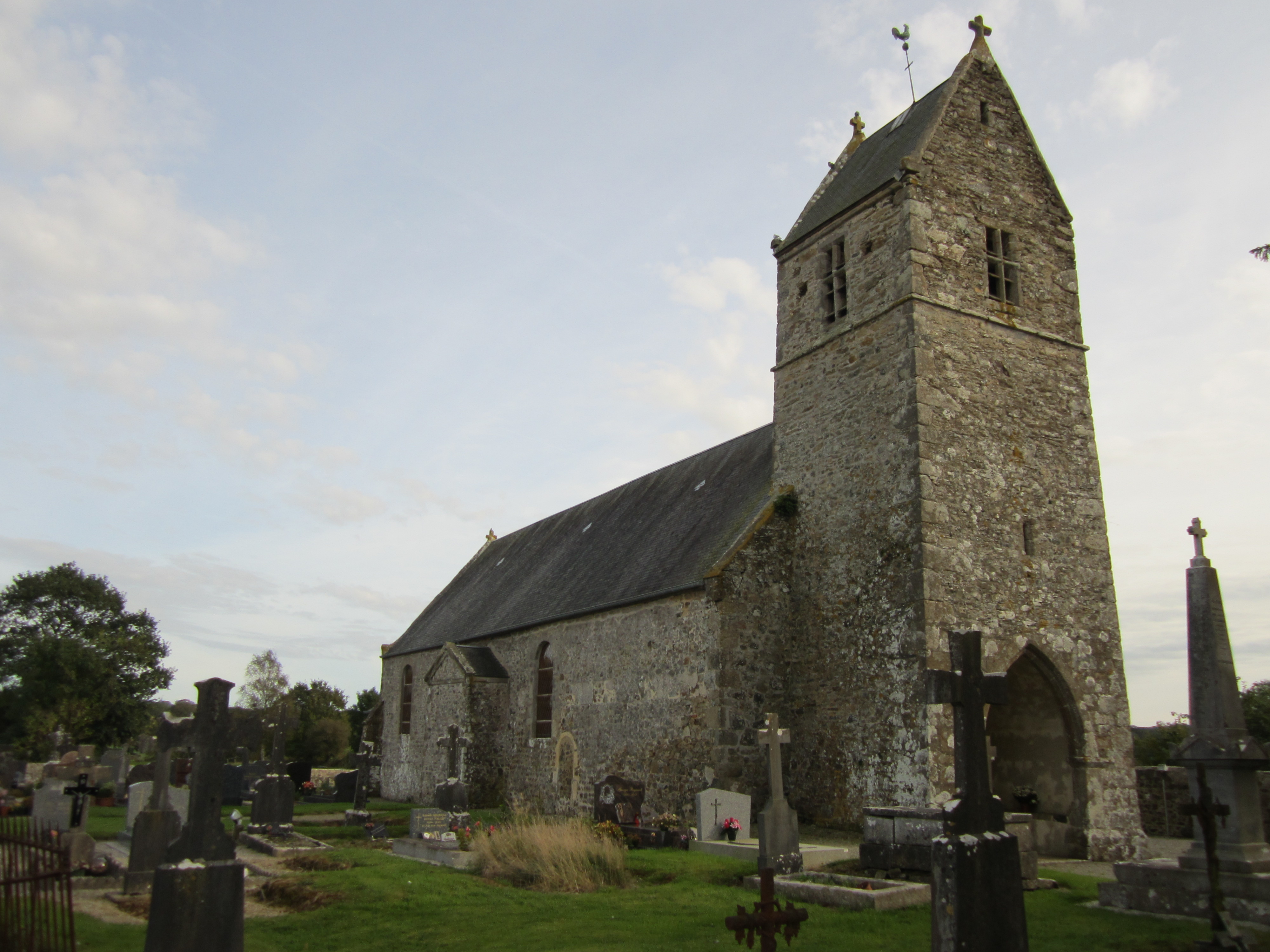 Servigny, Manche